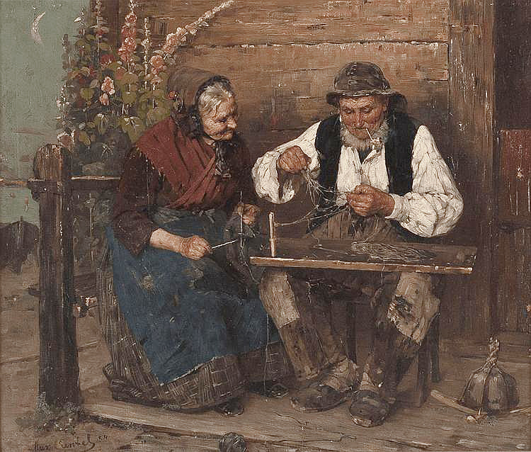 Alter Fischer mit seiner Frau